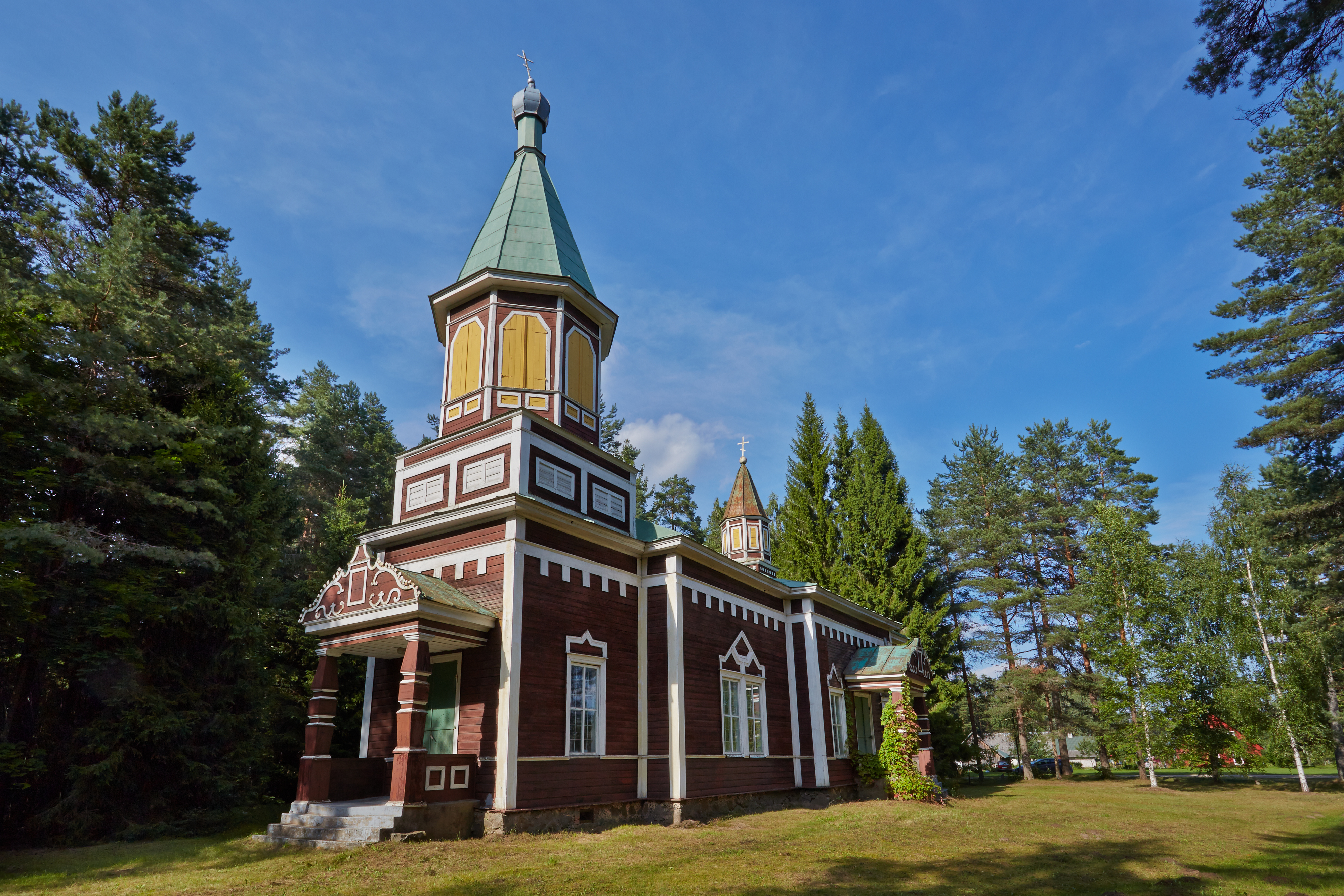 Mõniste-Ritsiku kirik 2013. aasta augustis.